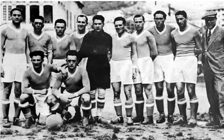 A line-up of A.C. Napoli in the 1928–29 season. From left to right, standing: Sallustro, Gariglio, Buscaglia, Fenili, Valeriani, Cassese, Gontrano Innocenti, Ghisi, Roggia, Terrile (manager); crouched: Paulo Innocenti, Scacchetti.